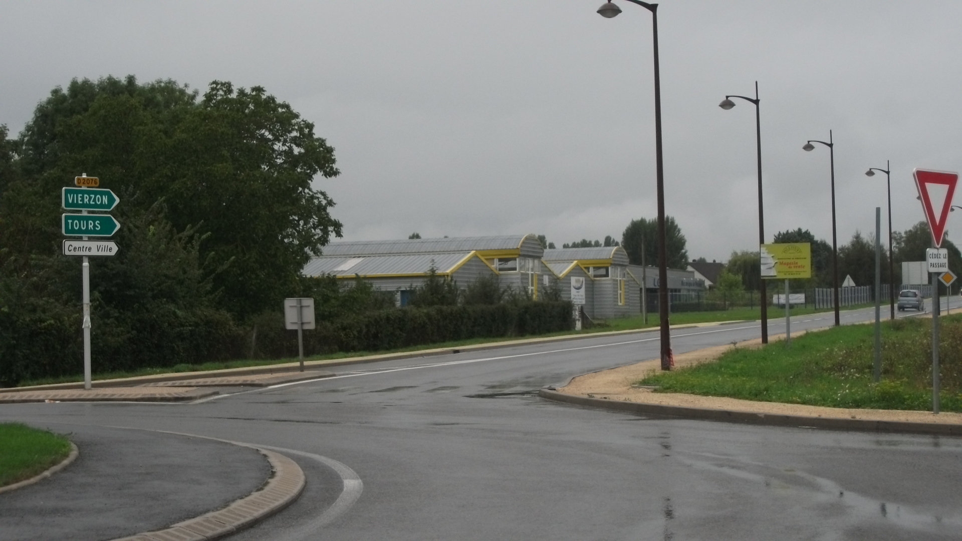 La RD 2076 (ex-RN 76) vers Vierzon et Tours à Mehun-sur-Yèvre (Cher, Centre, France)